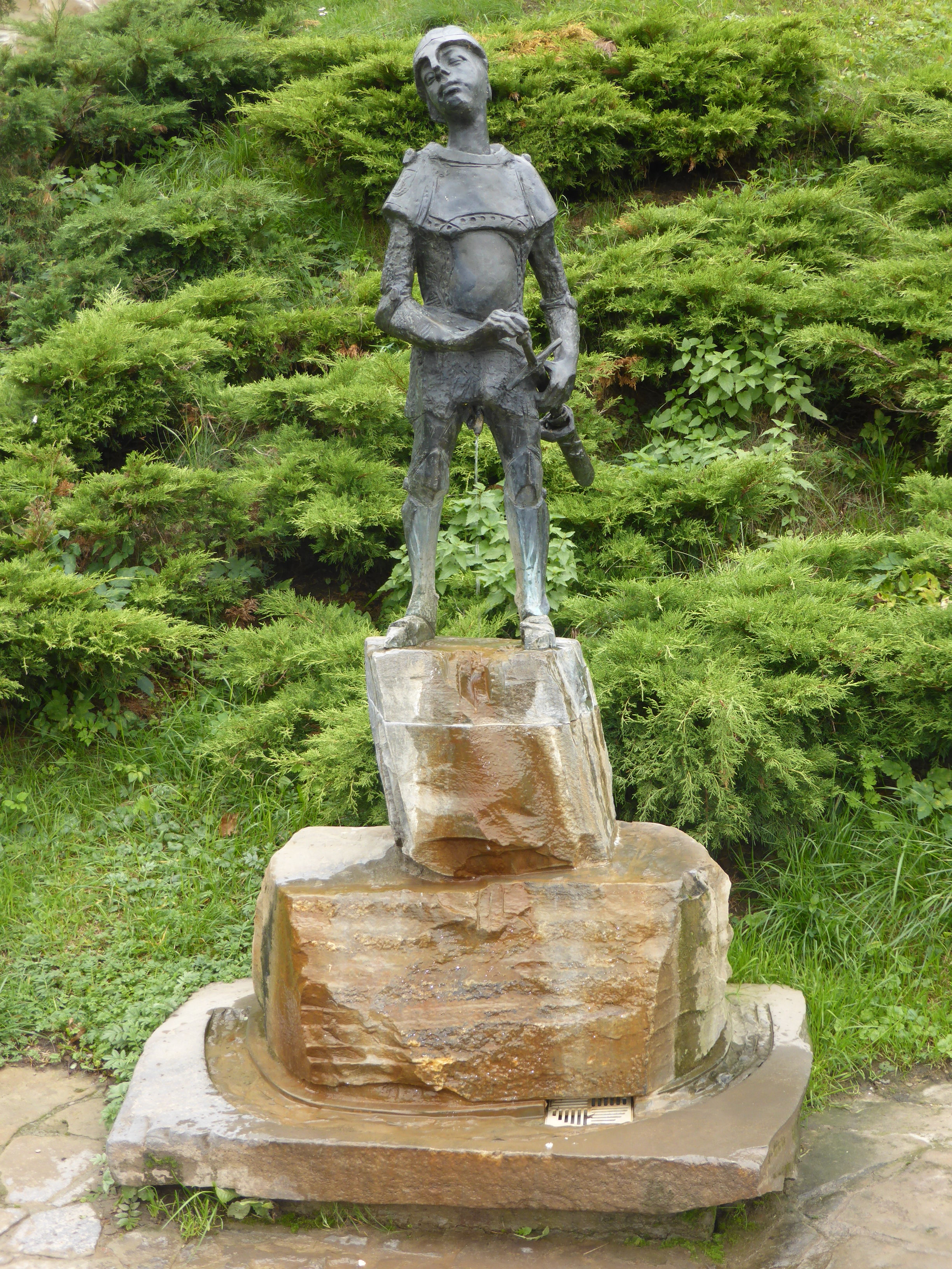 Burg Nowy Sącz - Schmiedebastei (Baszta Kowalska)